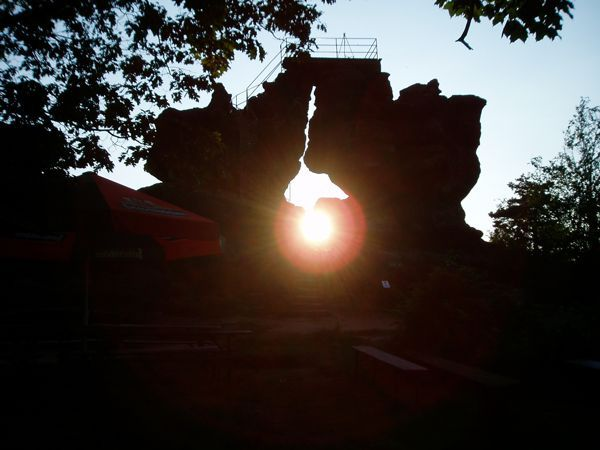 Felsentor Töpfer Sonnendurchgang Sommersonnenwende Sonnenuntergang 2009